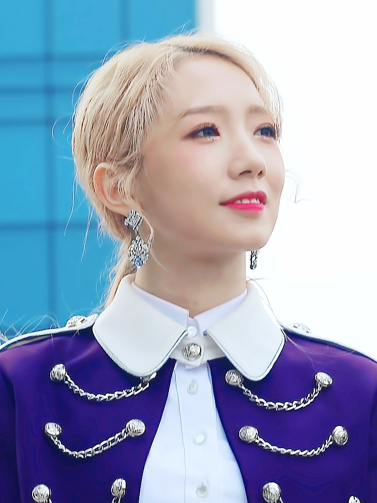 180317 우주소녀 미니팬미팅 직찍